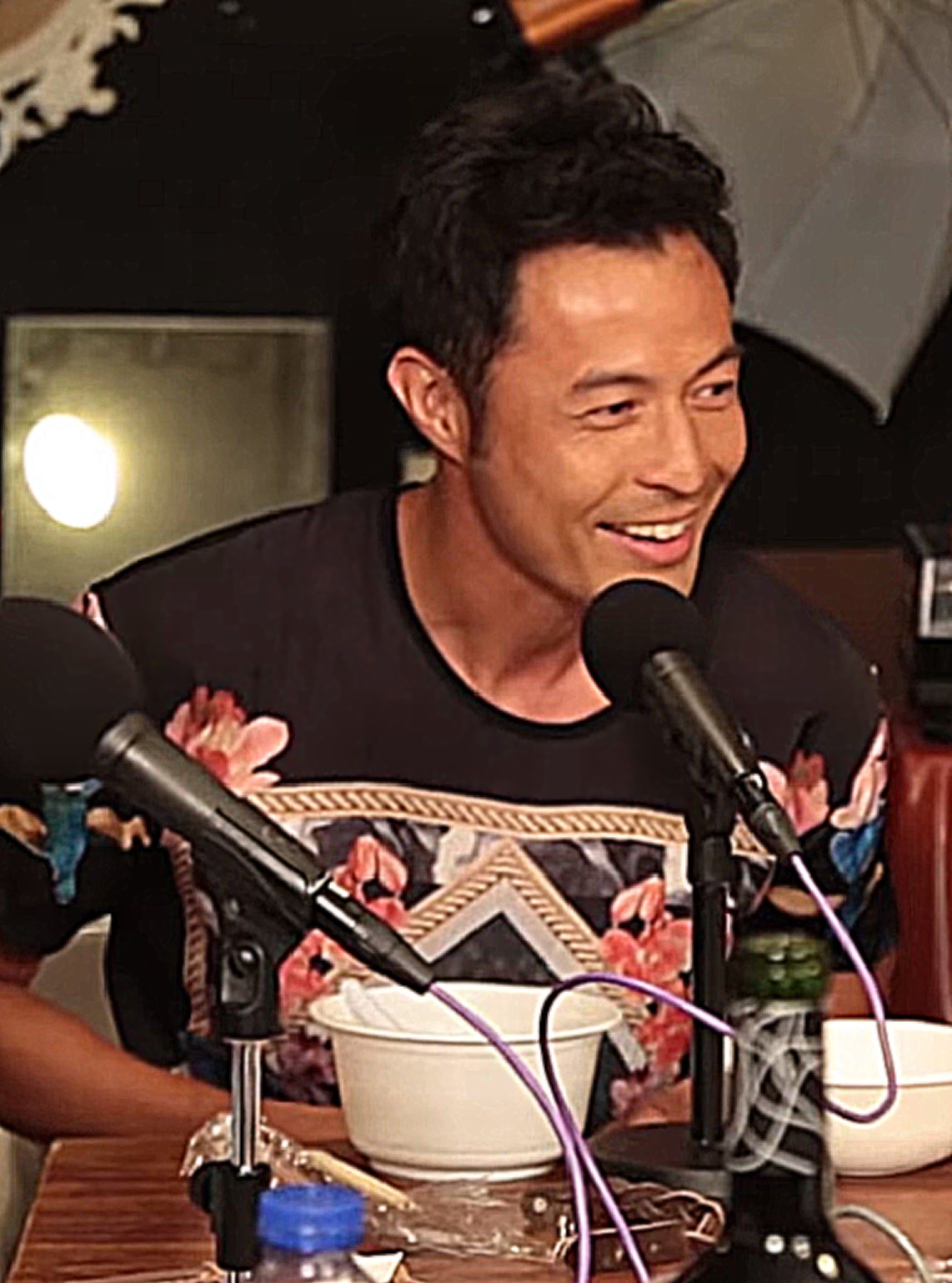 中文（香港）: 香港男演員，曾在無綫電視處境劇《愛·回家》裡，飾演查李施律師事務所律師「嚴謹」而為人認識